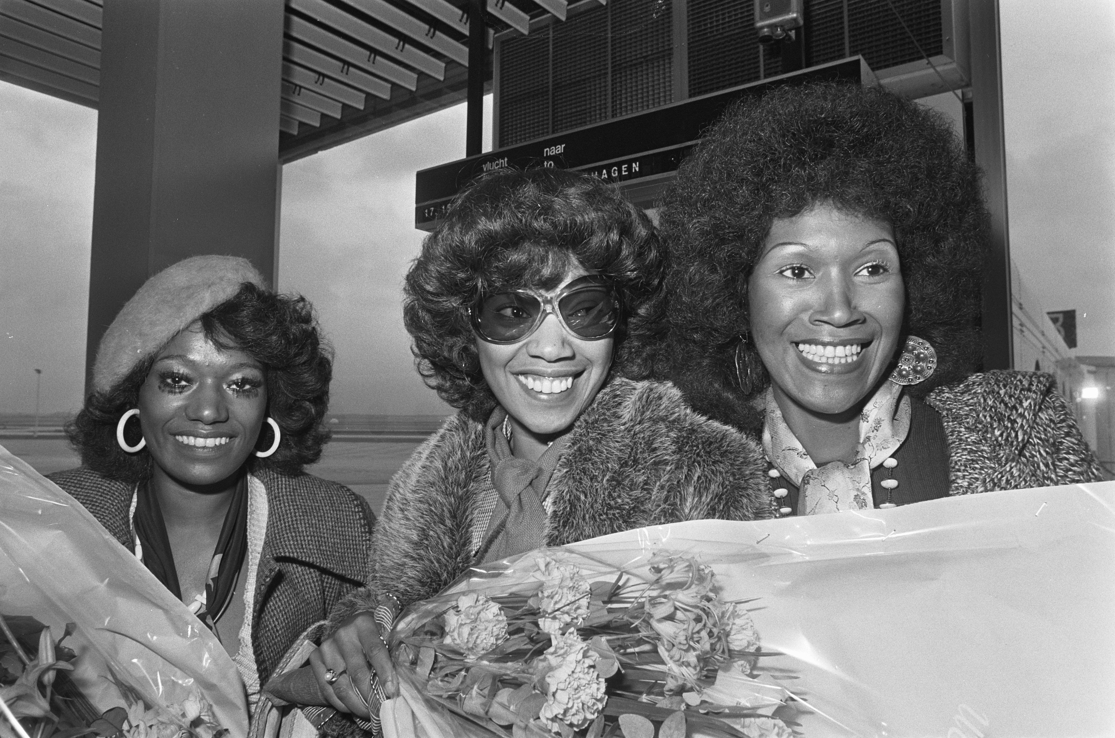 Collectie / Archief : Fotocollectie Anefo Reportage / Serie : [ onbekend ] Beschrijving : Pointer Sisters aangekomen op Schiphol voor optreden in Nederland; de Pointer Sisters (3) na aankomst Datum : 27 september 1974 Locatie : Noord-Holland, Schiphol Trefwoorden : aankomsten, zangeressen Fotograaf : Mieremet, Rob / Anefo Auteursrechthebbende : Nationaal Archief Materiaalsoort : Negatief (zwart/wit) Nummer archiefinventaris : bekijk toegang 2.24.01.05 Bestanddeelnummer : 927-4783